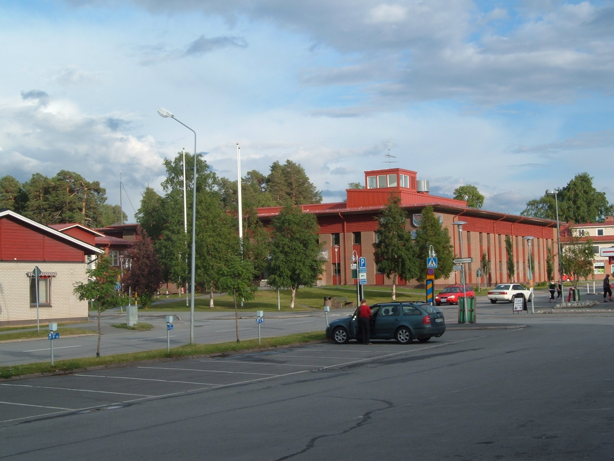 Krokoms kommunhus